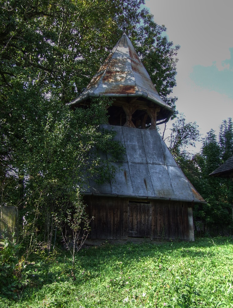 Biserica de lemn din Urişiu de Jos, judeţul Mureş. Clopotniţa.